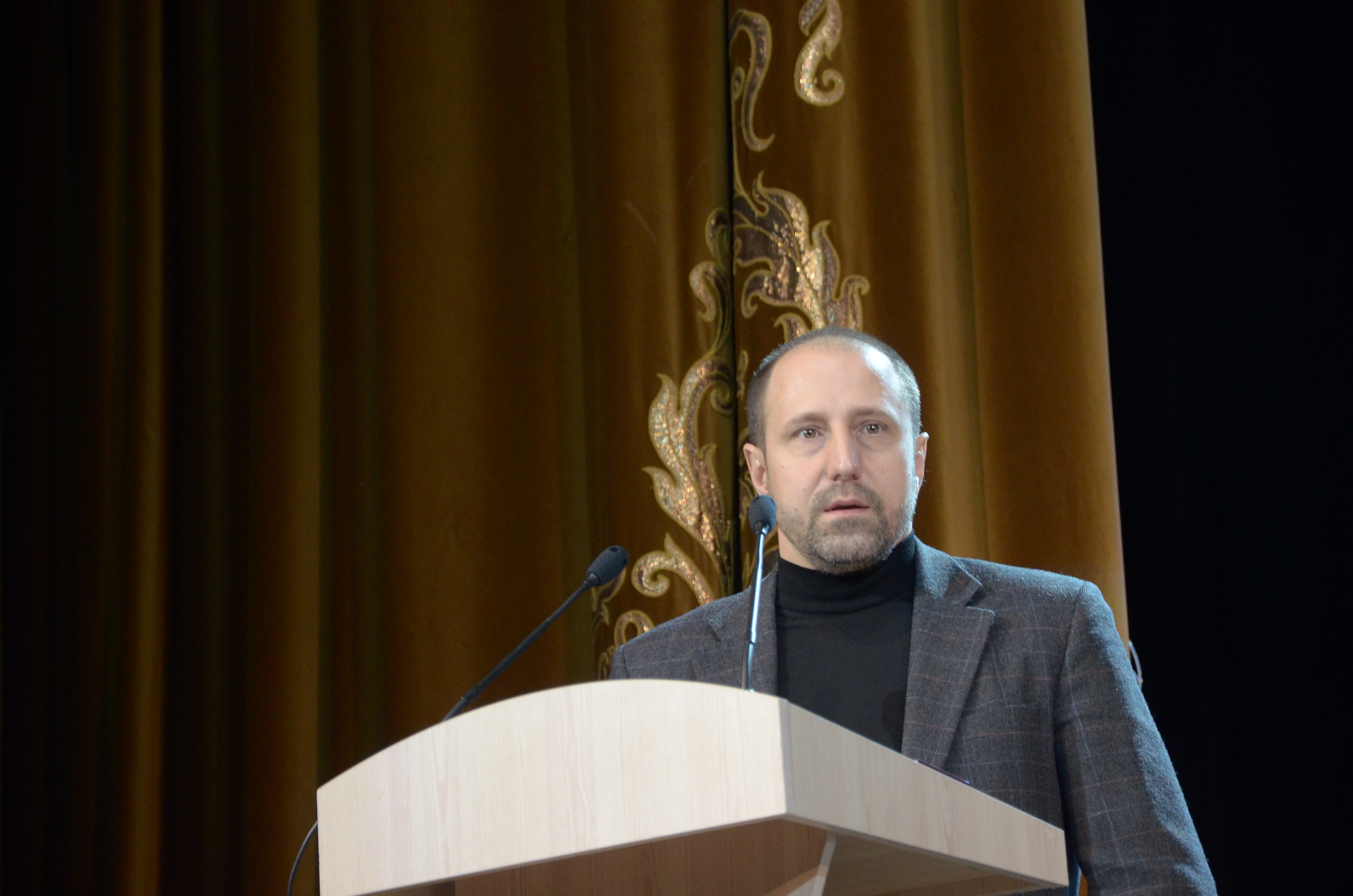 День спасателя в Донецке